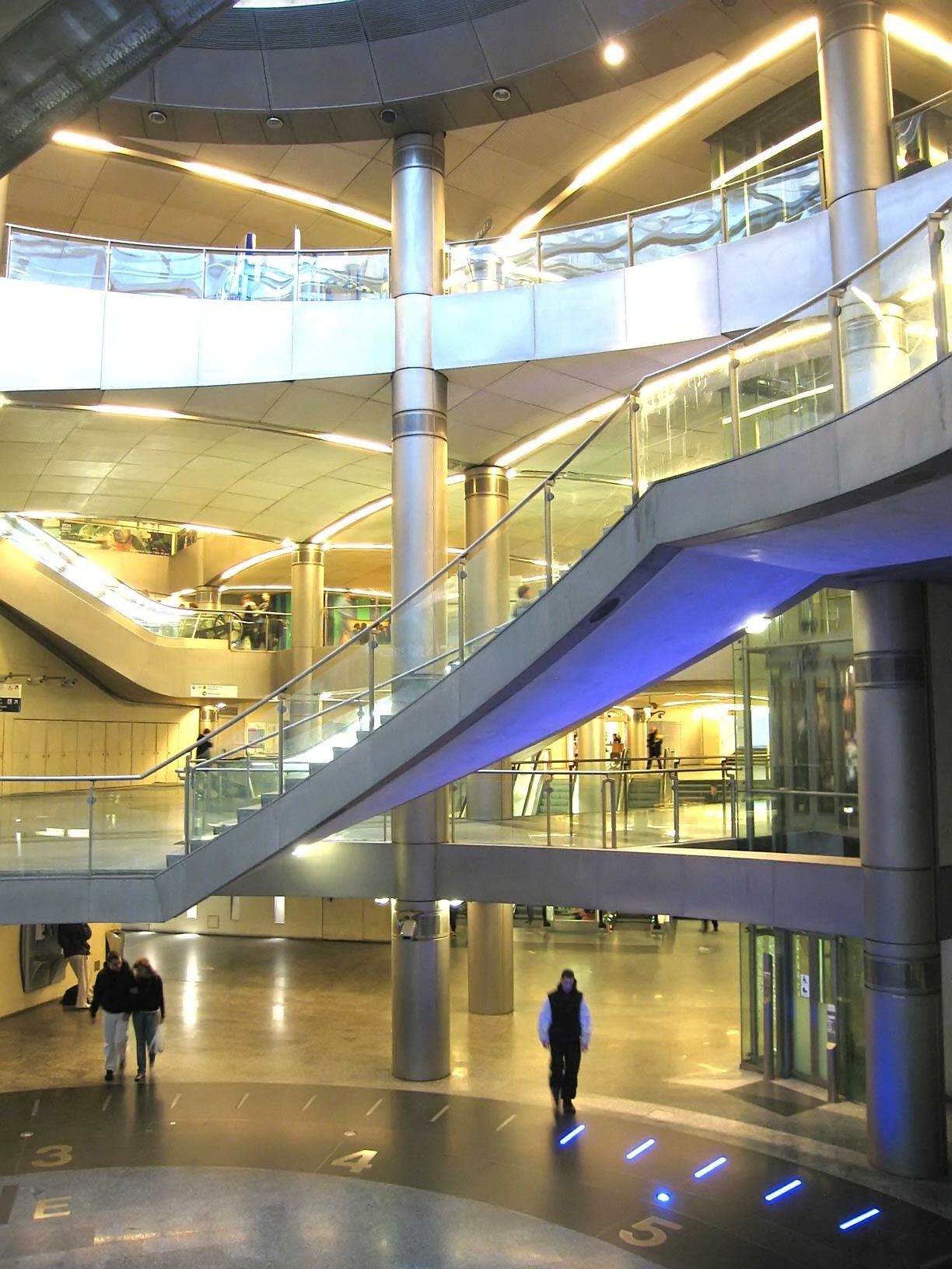 Métro de Paris, Salle d'échanges Saint Lazare, Paris, France